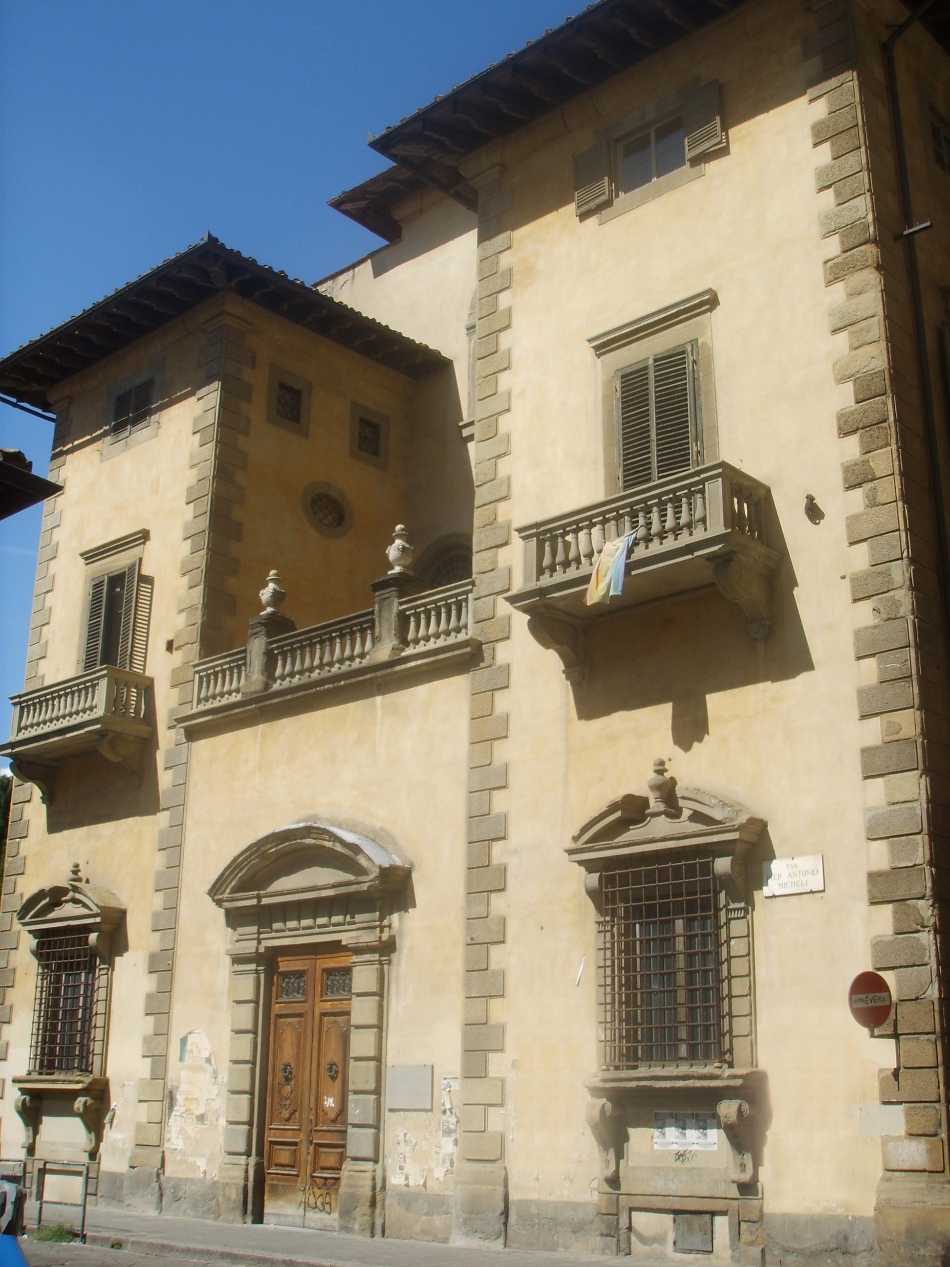 Palazzo di San Clemente in Florence, Italy